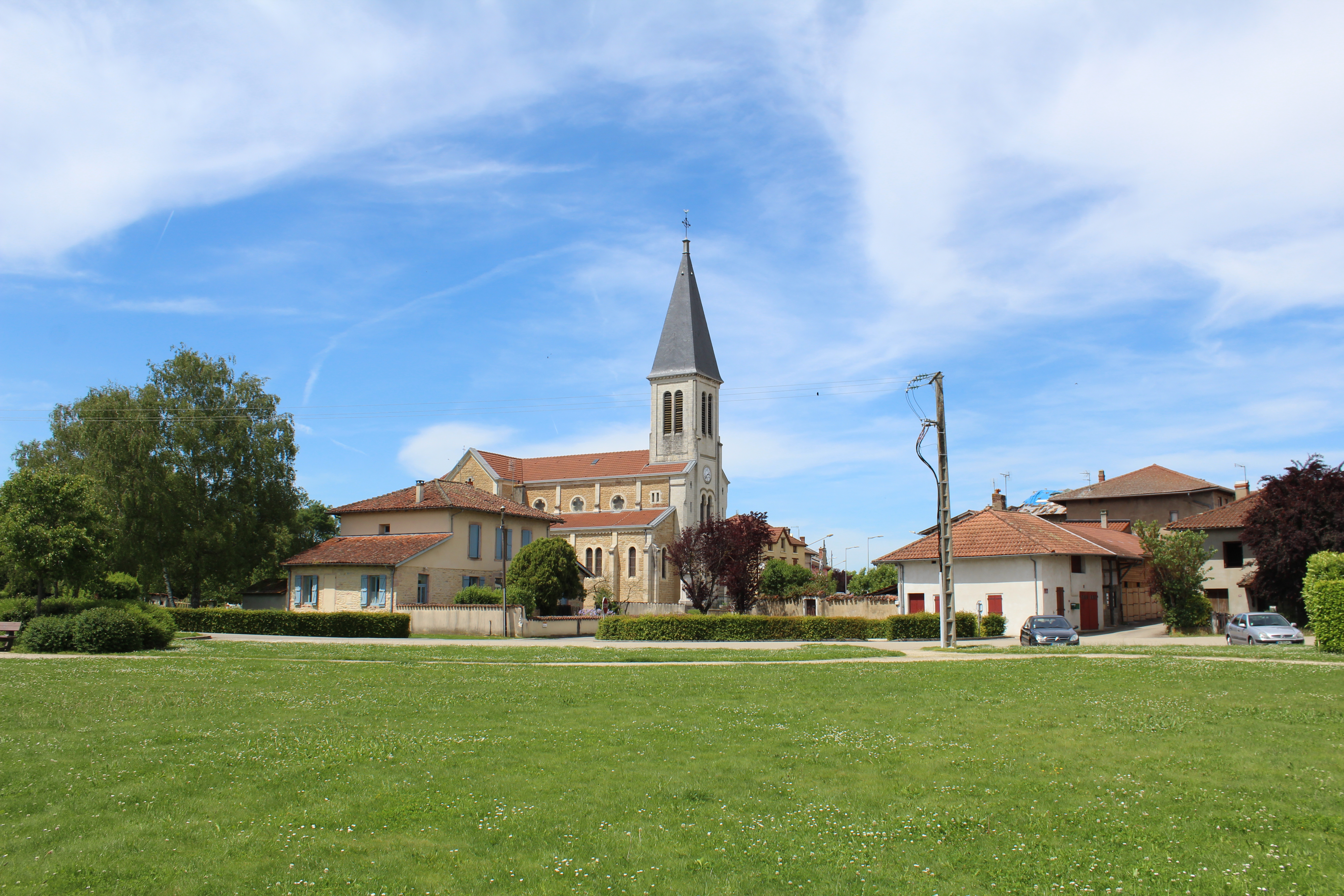 Église Saint-Julien de Saint-Julien-sur-Reyssouze.